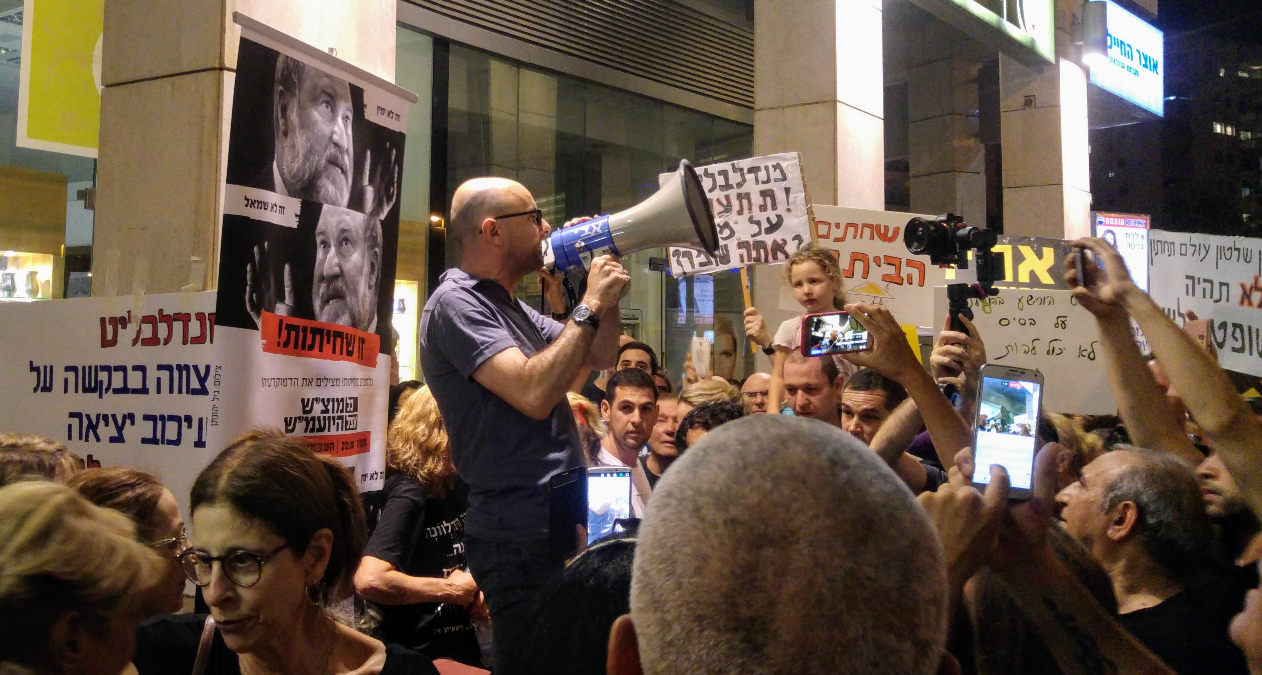 אלדד יניב נואם במהלך הפגנה נגד השחיתות השלטונית ליד קניון גנים בפתח תקווה